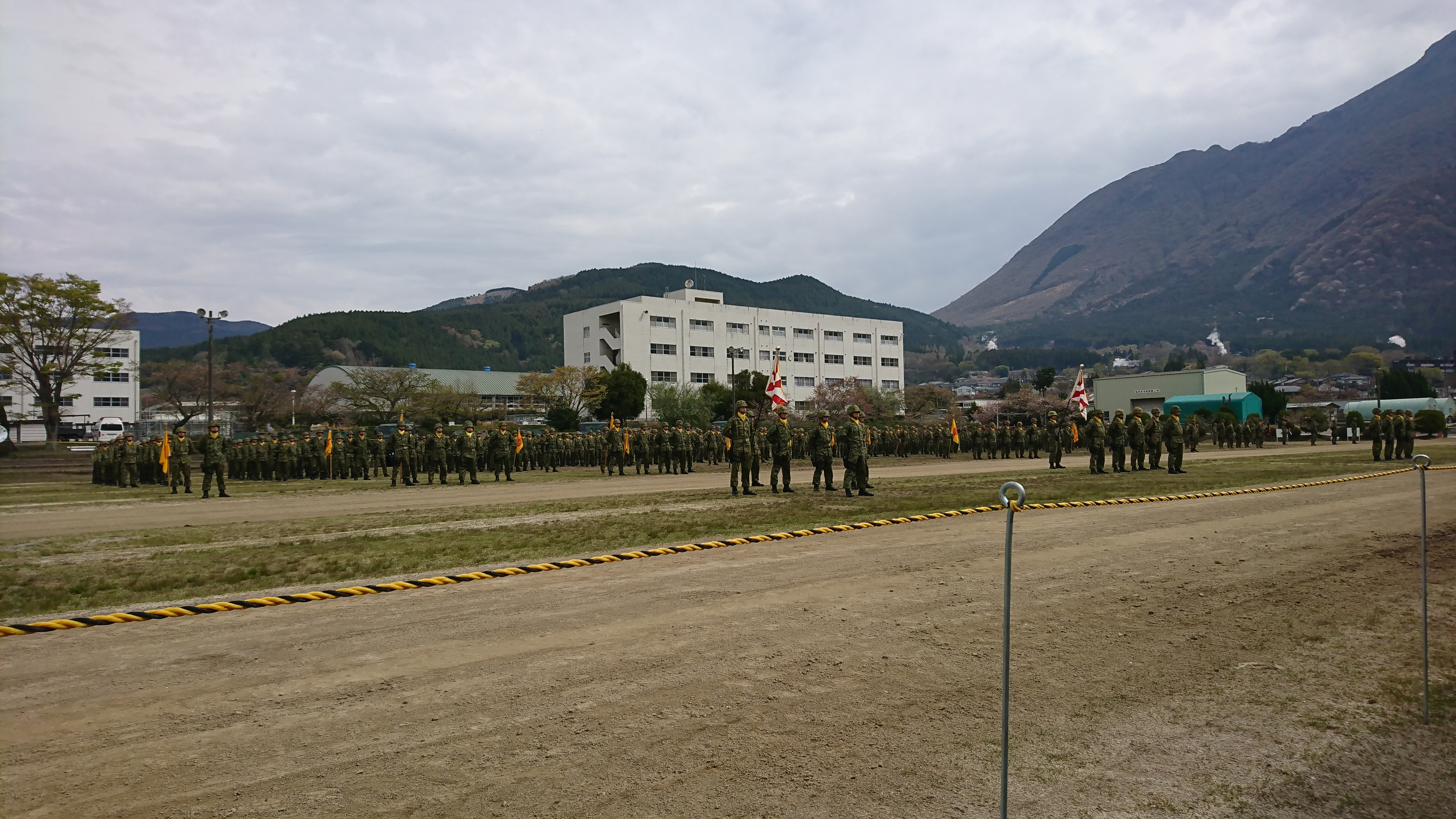 西部方面特科隊・西部方面特科連隊・第5地対艦ミサイル連隊・水陸機動団特科大隊が参列